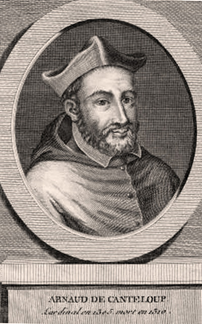 Cardinal Arnaud de Canteloup